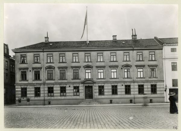 Wenngrenska huset, fotograf Aron Jonason, GSM